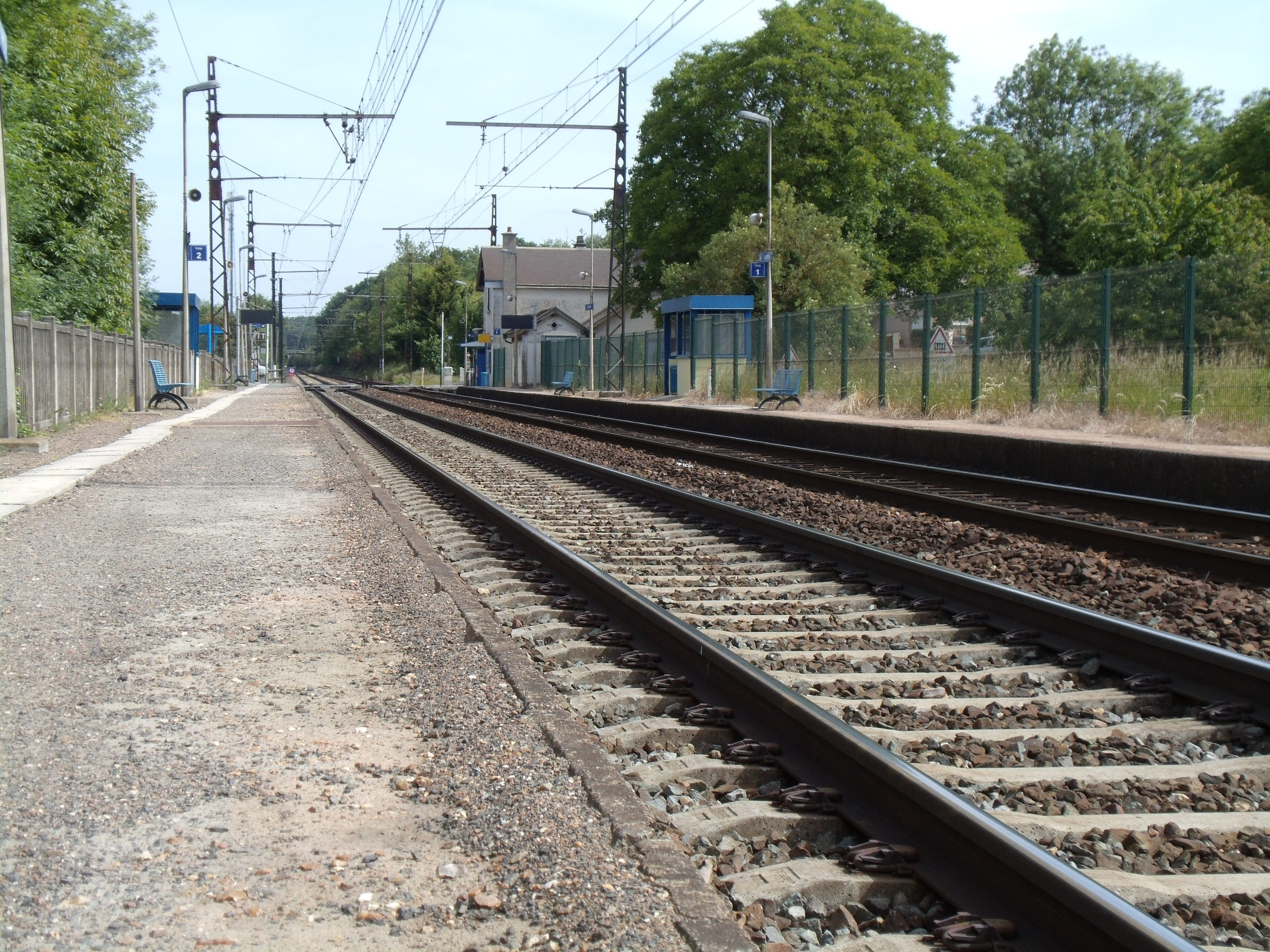 Vue des voies en direction de Paris; Le passage à niveau est au fond, après le bâtiment voyageurs